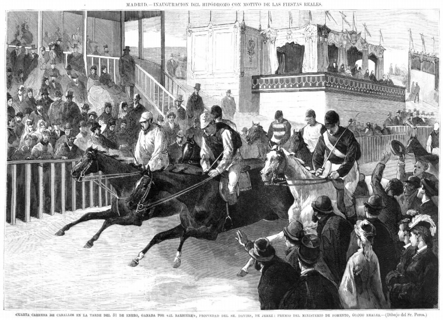 Cuarta carrera de caballos en la tarde del 31 de enero, ganada por "Il Barbiere", propiedad del sr. Davies, de Jerez: Premio del Ministerio de Fomento, 60.000 reales. Dibujo del Sr. Perea